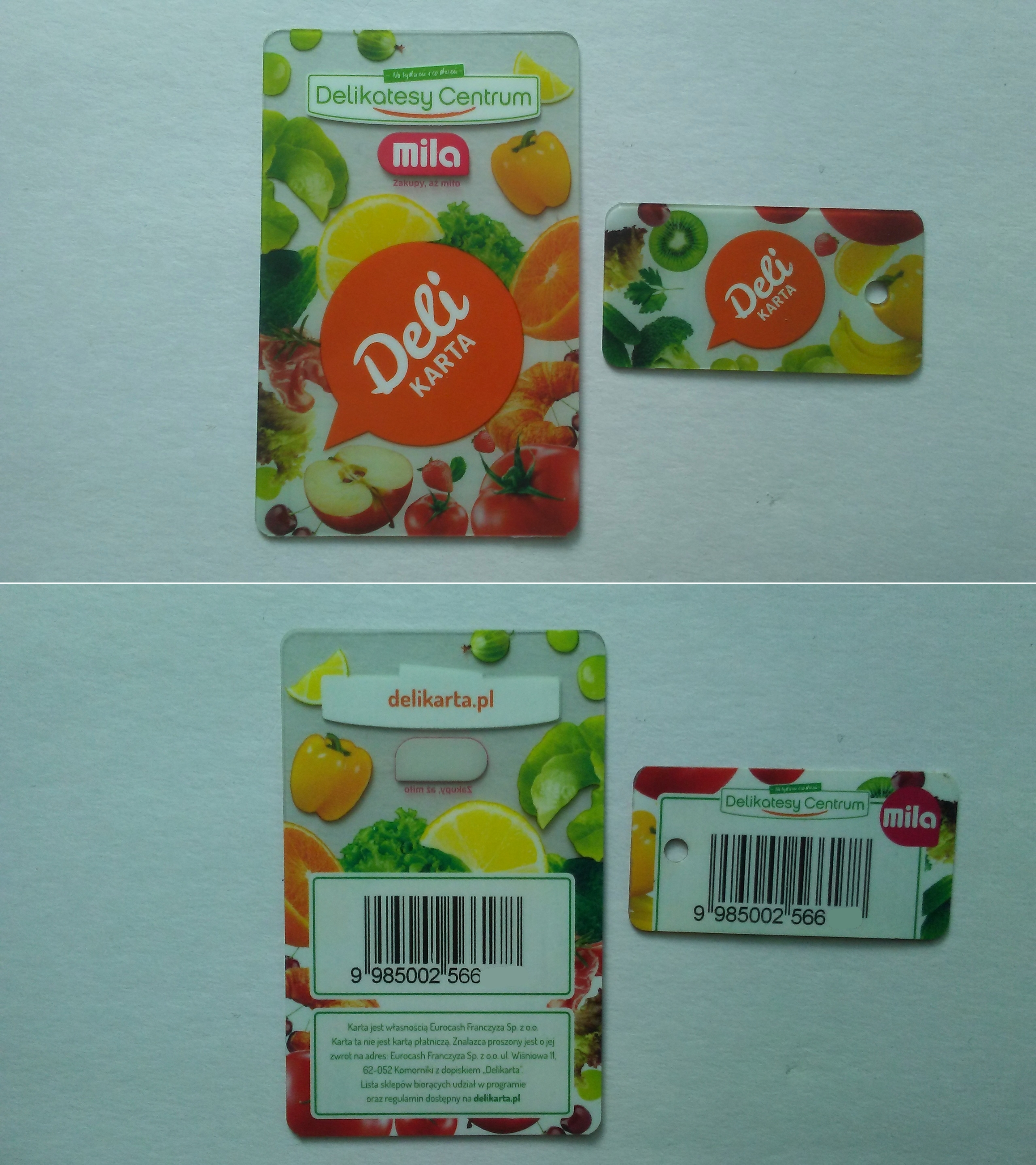 Delikarta – karta programu lojalnościowego polskiej sieci dyskontów „Mila”